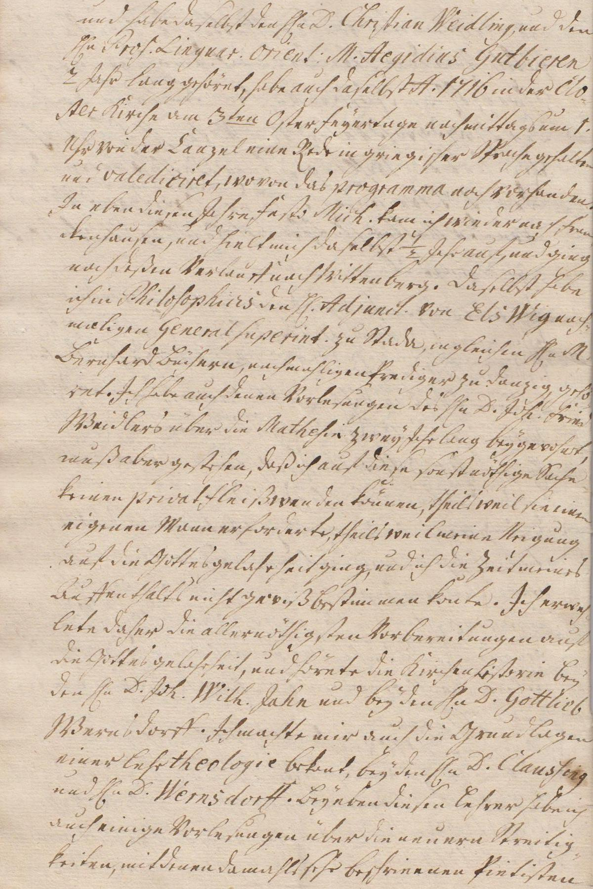 Seite 4 der Leichenpredigt für den Pastor August Wilhelm Reinhart (1696/1770), Bürger der Stadt Heringen an der Helme.